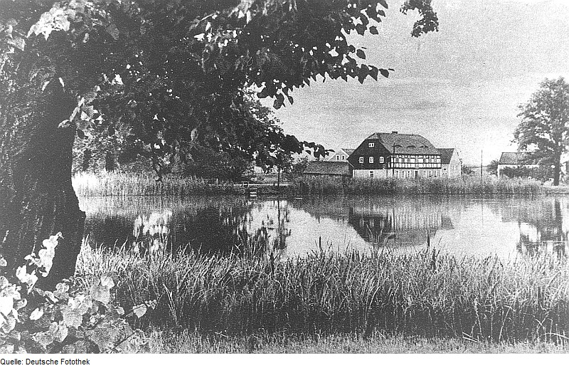 Original image description from the Deutsche Fotothek Radibor-Milkwitz. Blick über Mühlteich zur Wassermühle, aus: Oberlausitzer Heimatbuch, Sachsenverlag, 1950